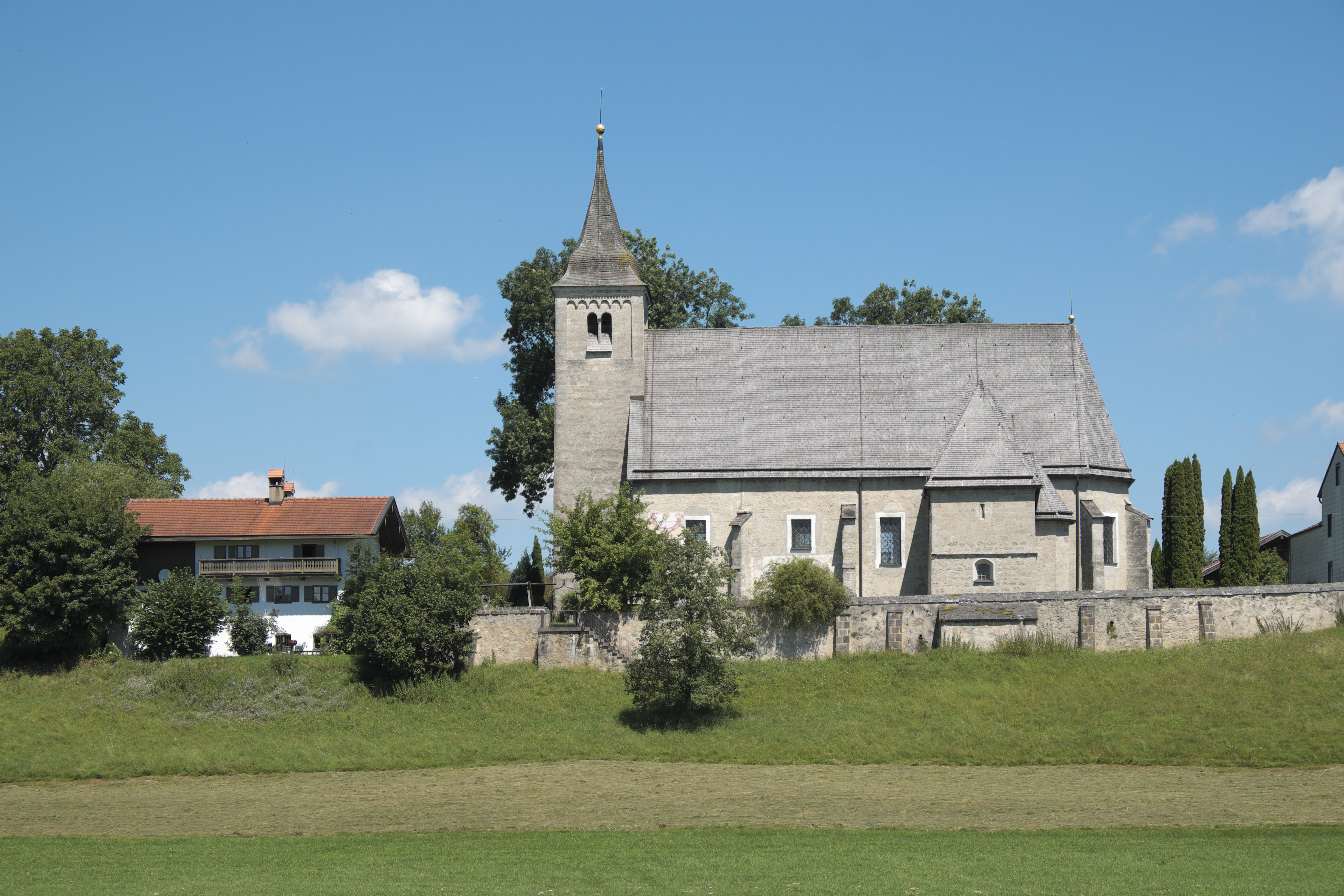 Katholische Filialkirche St. Wolfgang in Sankt Wolfgang, einem Ortsteil von Altenmarkt an der Alz im Landkreis Traunstein (Bayern/Deutschland)